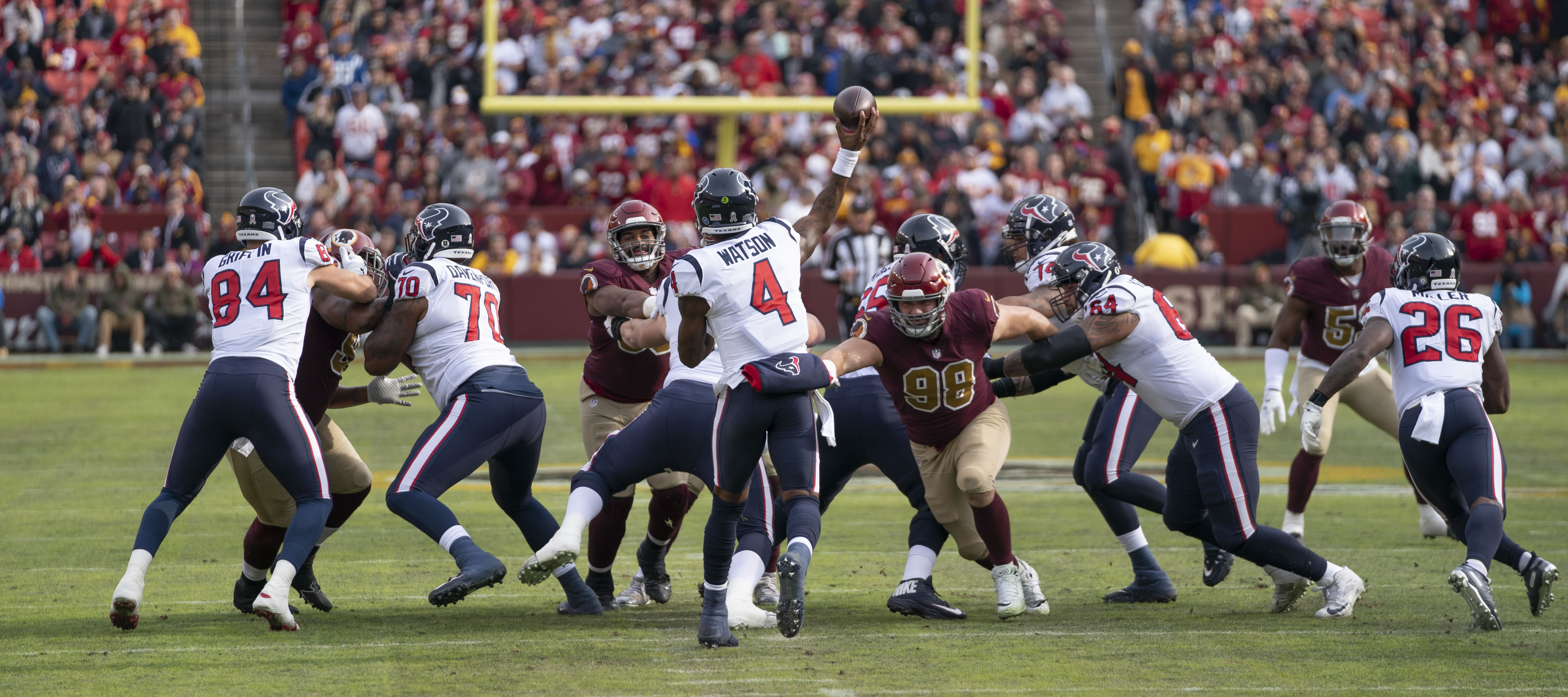 Texans at Redskins 11/18/18